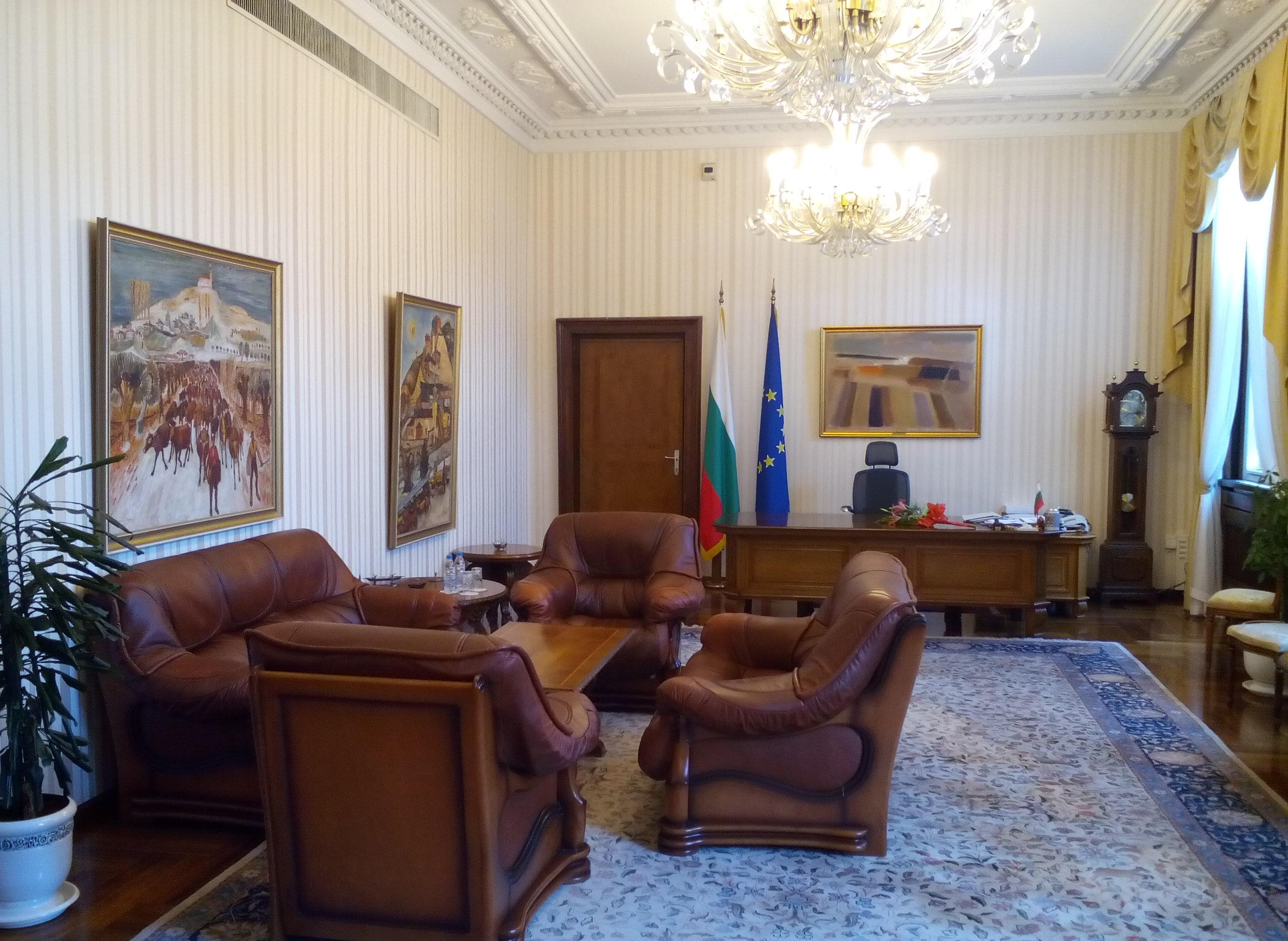 Офисът на президента на Република България